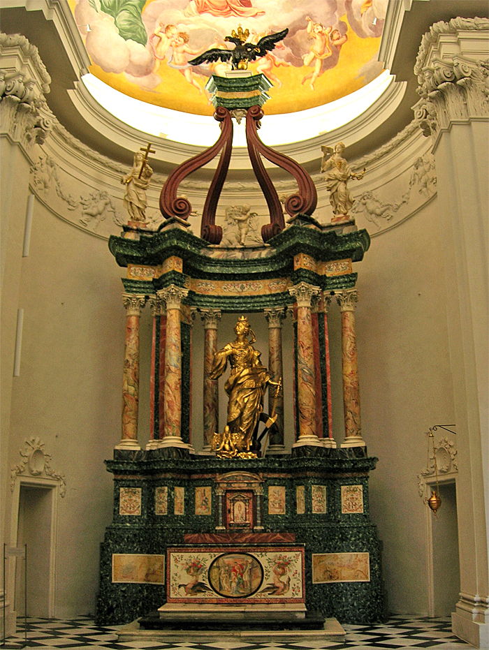 Inneres der Katharinenkirche, Graz